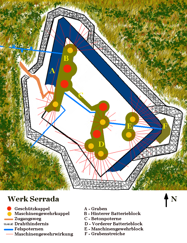 Plan des k.u.k. Festungswerks Serrada in Südtirol